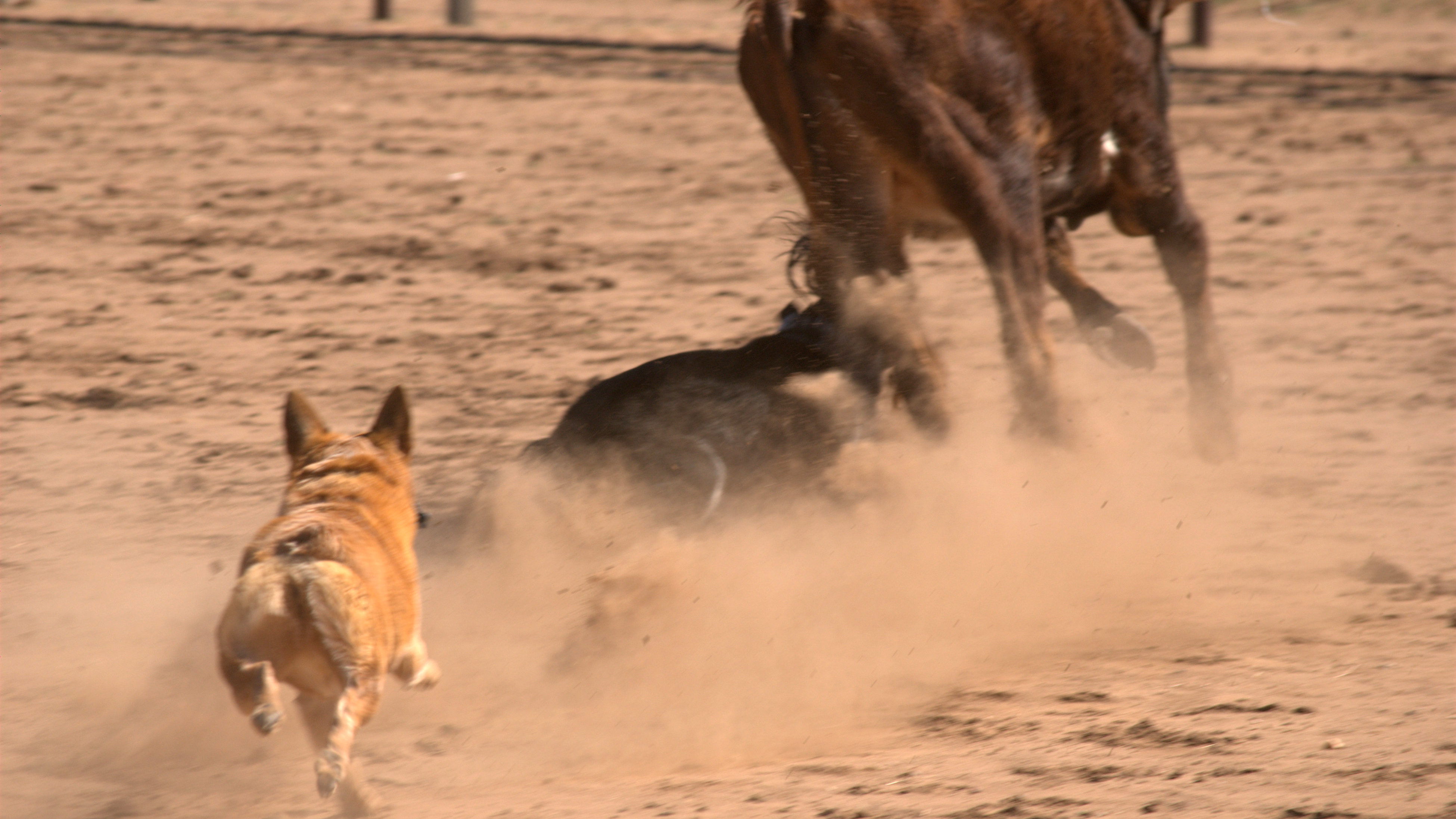 Herding with dogs